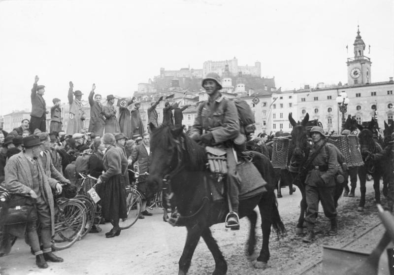 Der Jubel der österreichischen Volksgenossen begrüsste die Soldaten in Salzburg. Überaus herzlich war der Empfang der deutschen Stadt Salzburg, wo ihnen von der Bevölkerung stürmische Kundgebungen dargebracht wurden. UBz den Zug der Truppenkolonnen durch die Strassen von Salzburg. 13.3.1938 [Herausgabedatum] Scherl Bilderdienst, Berlin